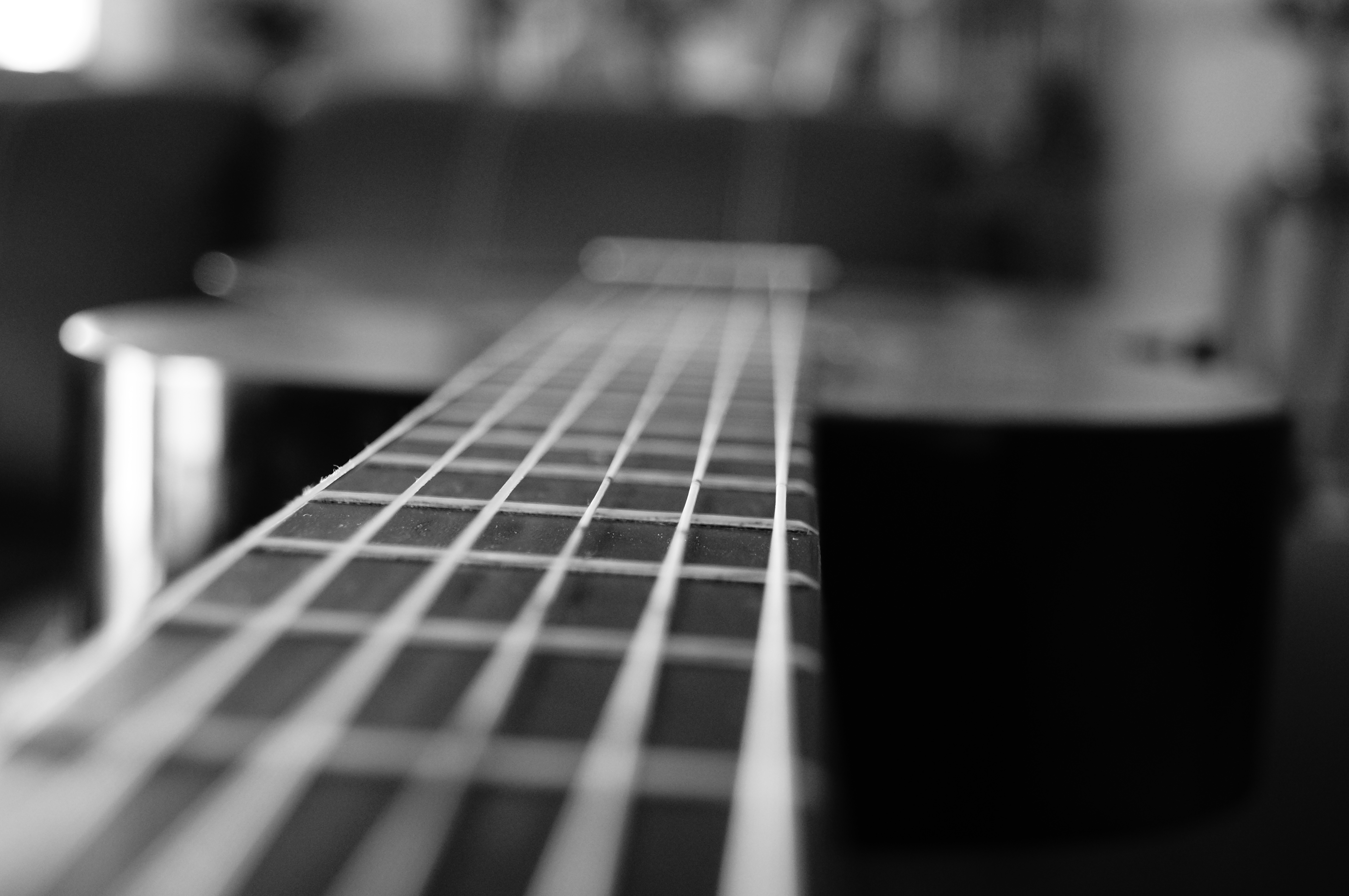 manche de guitare classique